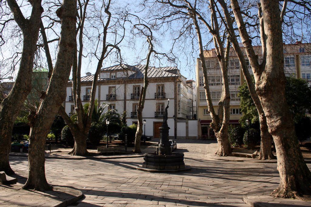 Praza de Azcárraga, A Coruña